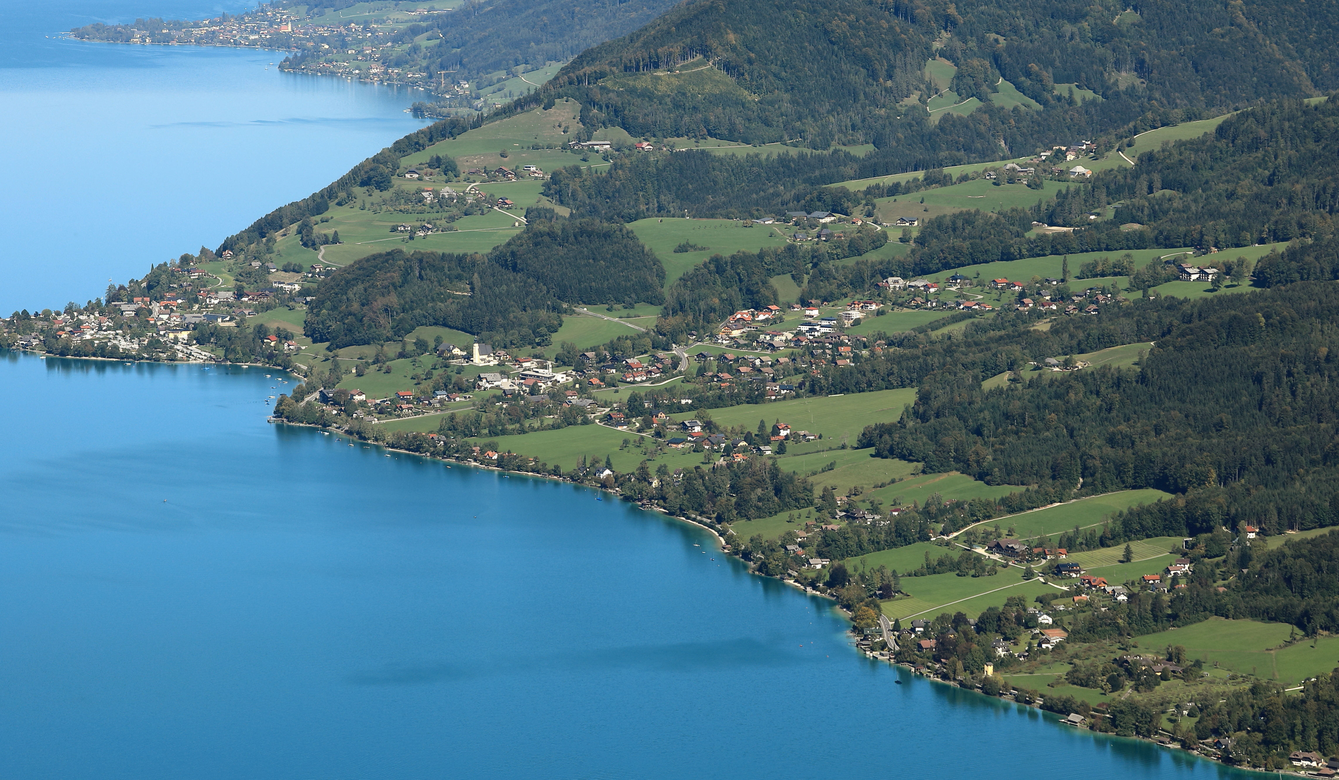 Blick von der Meisterebenalm (Atterseeblick) auf die oberösterreichischen Gemeinde Steinbach am Attersee.